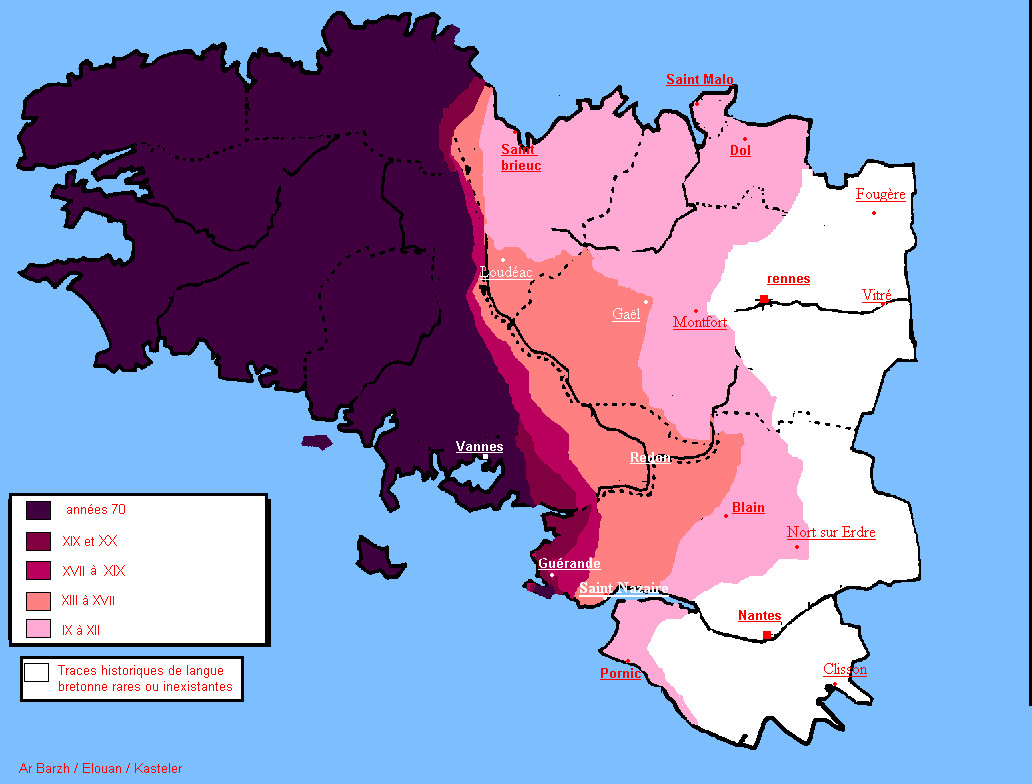 Carte créée par moi-même et deux amis. Libre de droit. Elle présente le recul de la langue bretonne.